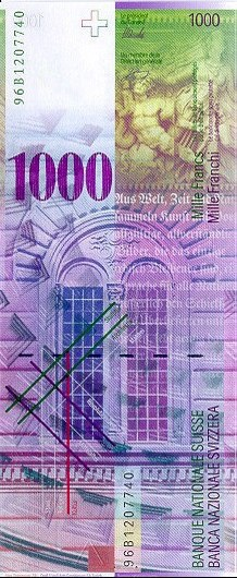 Il palazzo Strozzi é raffigurato sulla banconota svizzera da 1000 Franchi (1996-2019)